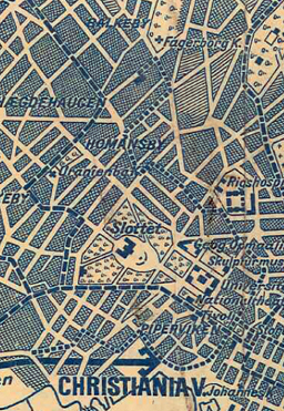 Linjen Vestbanen-Homansbyen på gammelt sporveiskart.